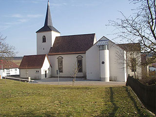 Kirche Abersfeld "Zu den Heiligen Drei Königen" (älterer Teil "Mariä Himmelfahrt")